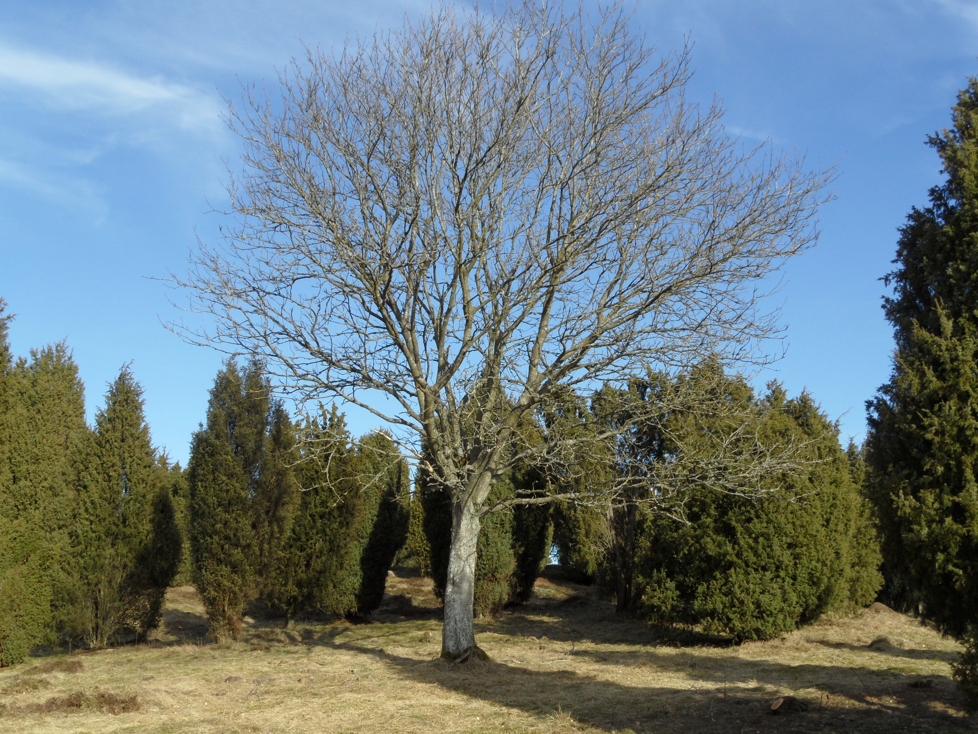 Munkarps fälad, enefälad en solig vårvinterdag